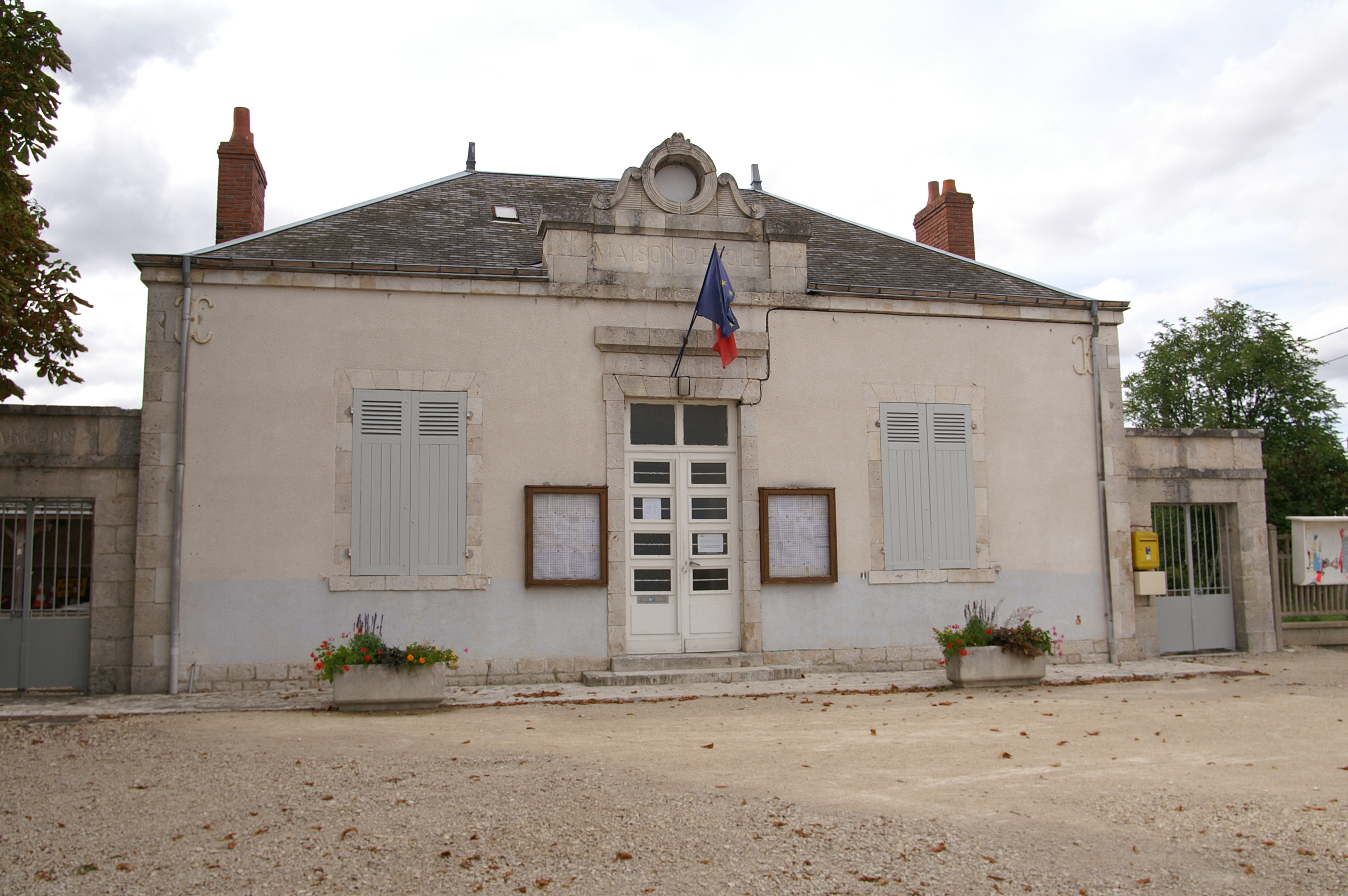 Mairie de Bucy-Saint-Liphard.